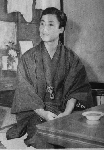 萬屋錦之助（初代中村錦之助）